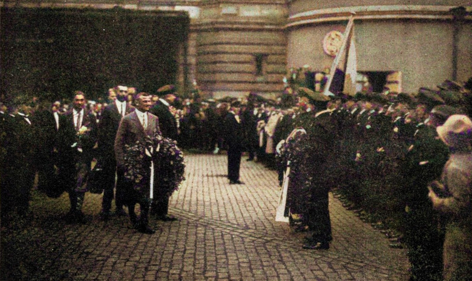 Empfang der Mannschaft der Kölner Rudergesellschaft 1891 e. V. am Hauptbahnhof Köln, die 1927 im Achter in Schwerin die deutsche Rudermeisterschaft gewann.